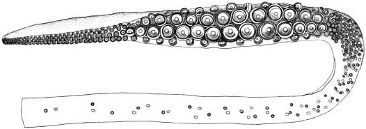 Giant squid tentacle club